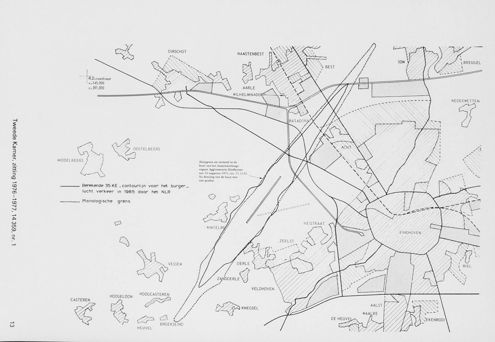 Op de kaart is tevens de planologische grens van het vliegveld ingetekend. Bijlage, behorend bij de Nota betreffende Welschap met betrekking tot de geluidsoverlast, veroorzaakt door het militaire luchtverkeer. Deze vliegbasis was reeds vroeg een bron van klachten over geluidshinder. In 1968 heeft de toenmalige minister van Defensie, mede naar aanleiding van deze klachten, als uitgangspunt voor nader overleg aangegeven dat de vliegbasis Eindhoven tot 1981 door de Koninklijke Luchtmacht overeenkomstig de bestaande bestemming in gebruik zou blijven; daarna zou worden afgezien van het gebruik van deze vliegbasis in vredestijd behoudens incidenteel medegebruik. Vervolgens heeft het gemeentebestuur van Eindhoven onder aanbod van de benodigde gronden, verzocht om, in plaats van de bestaande baan te renoveren, een nieuwe, gunstiger baan aan te leggen, waardoor de vorenbedoelde klachten zouden worden weggenomen. Hierdoor zou de burgerluchtvaart bevorderd worden.